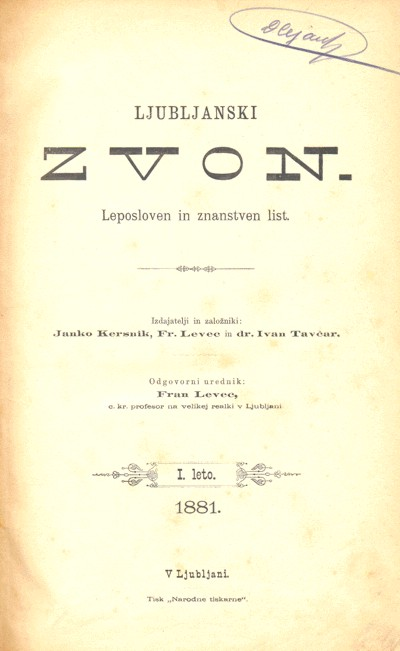 First edition of the Slovene magazine Ljubljanski zvon (1881)